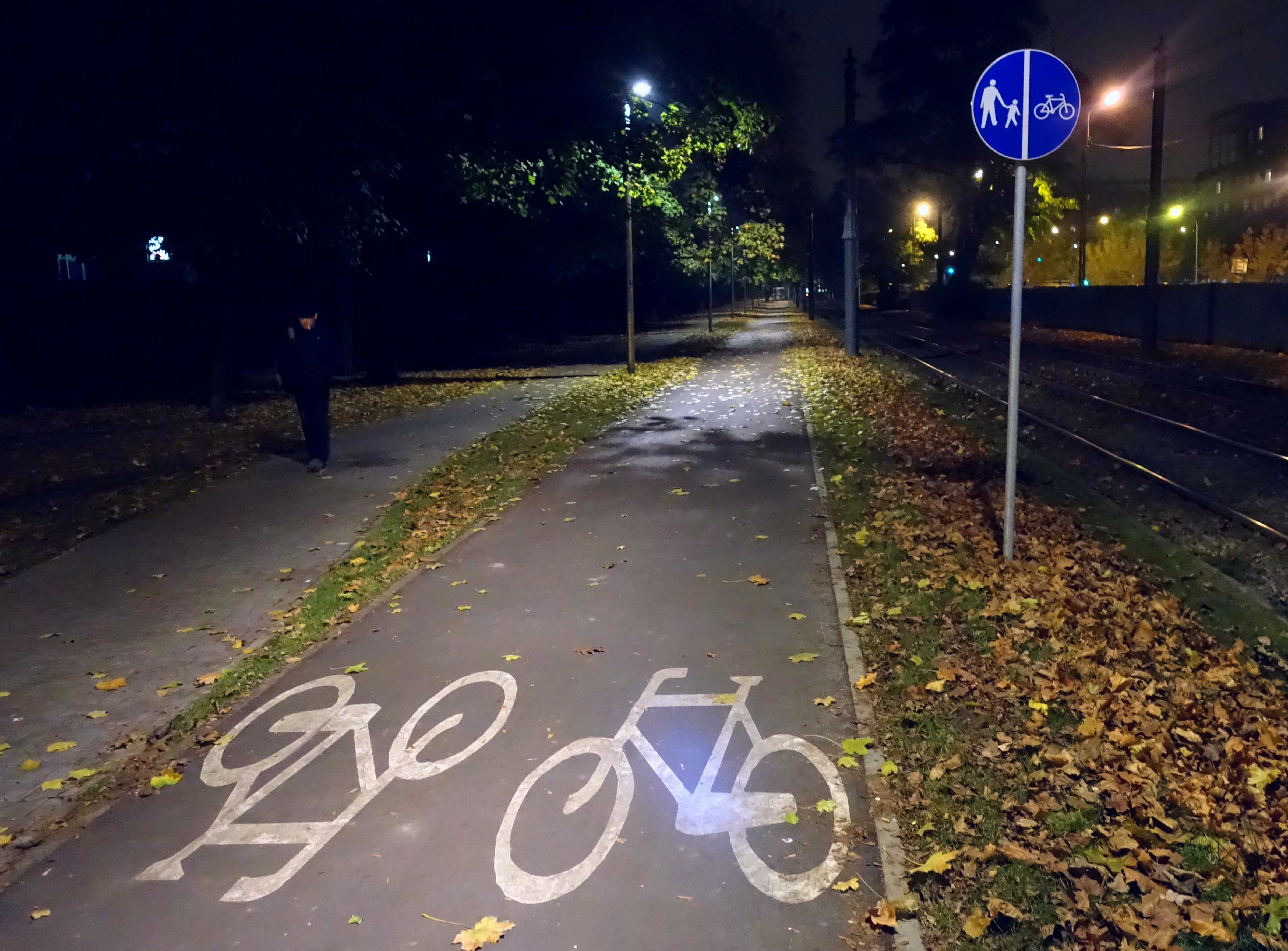 Warszawa, oświetlona droga dla rowerów wzdłuż ulicy Jagiellońskiej (koło zoo)